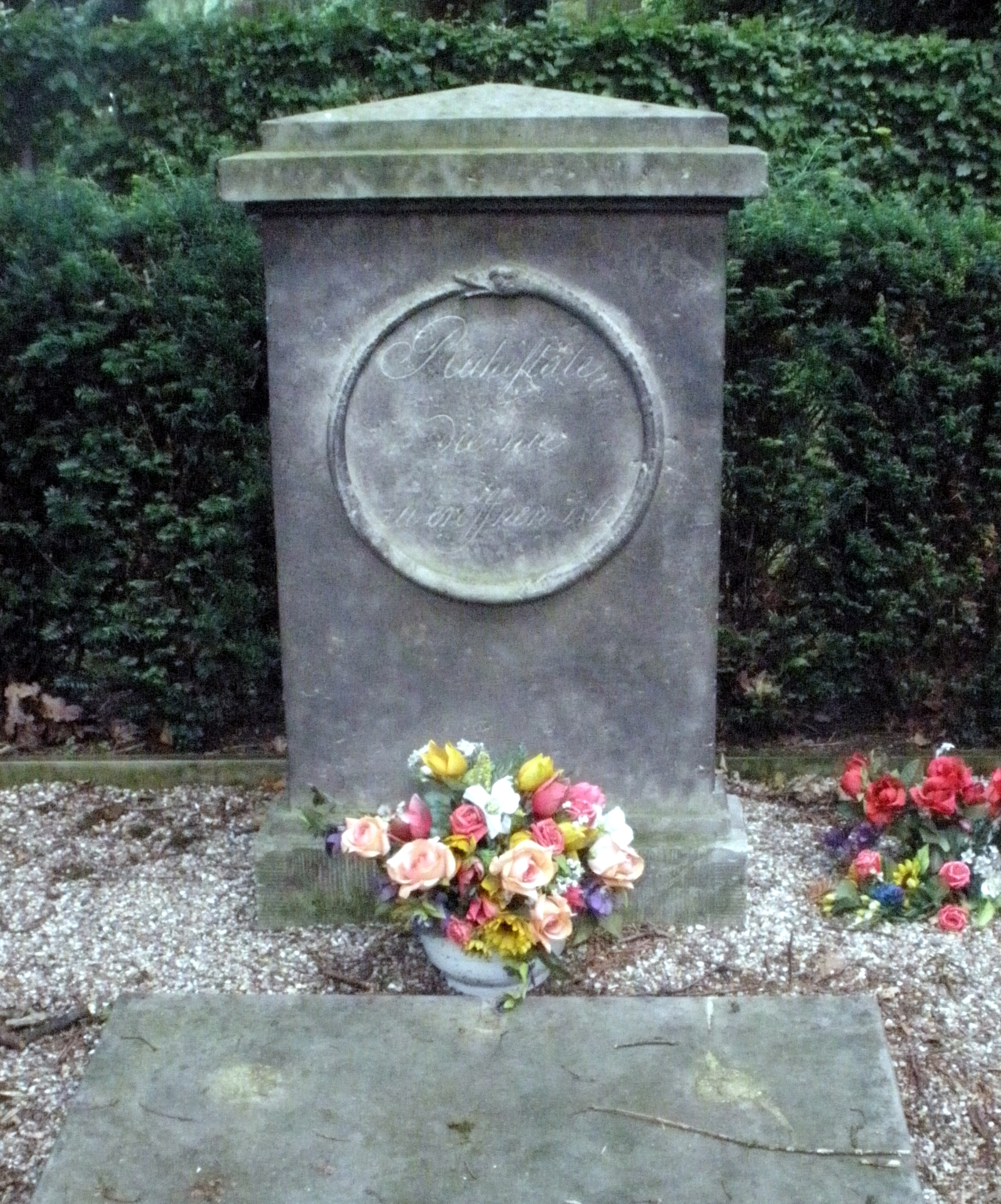 grabstelle Juliane Louise Prinzession von Ostfriesland, 16. November 1657 Aurich - 30. Oktober 1715 Hamburg, Friedhof Ohlsdorf